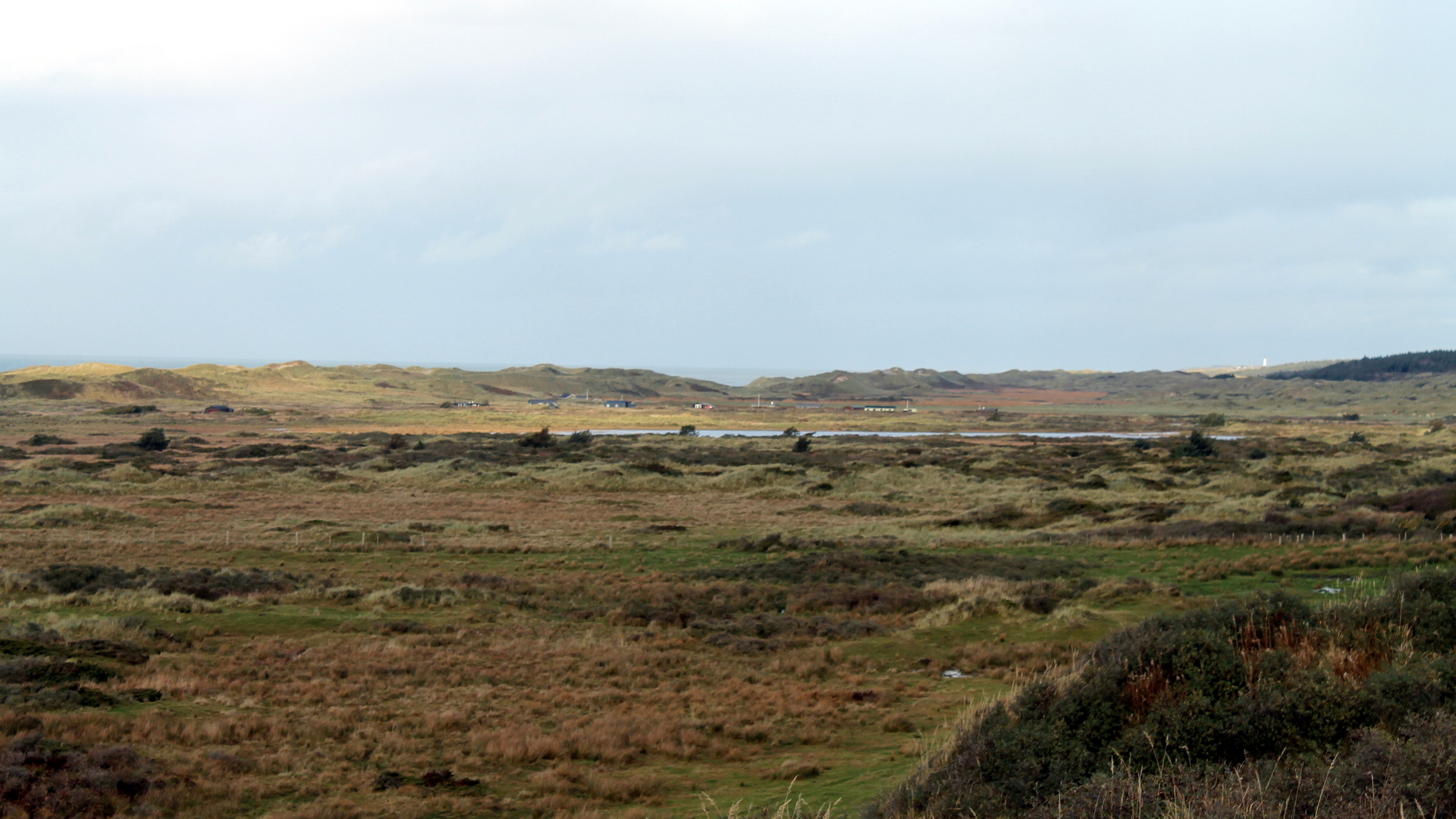 Vandplasken set fra Lien; i baggrunden: Hirtshals fyr